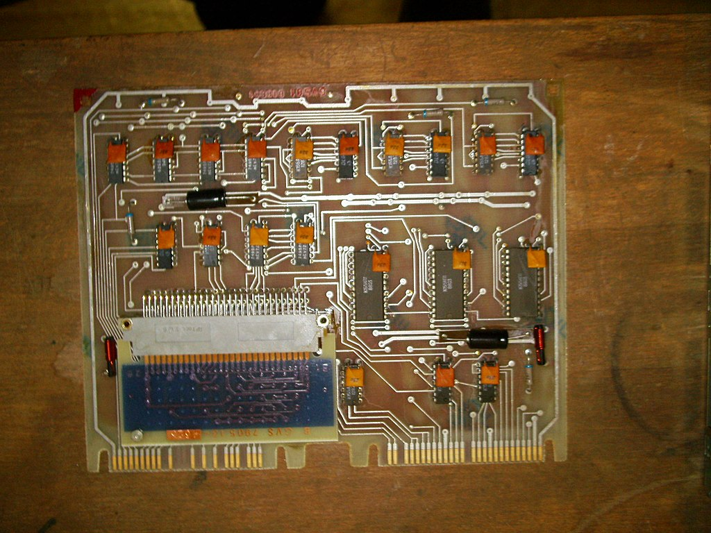 проверка